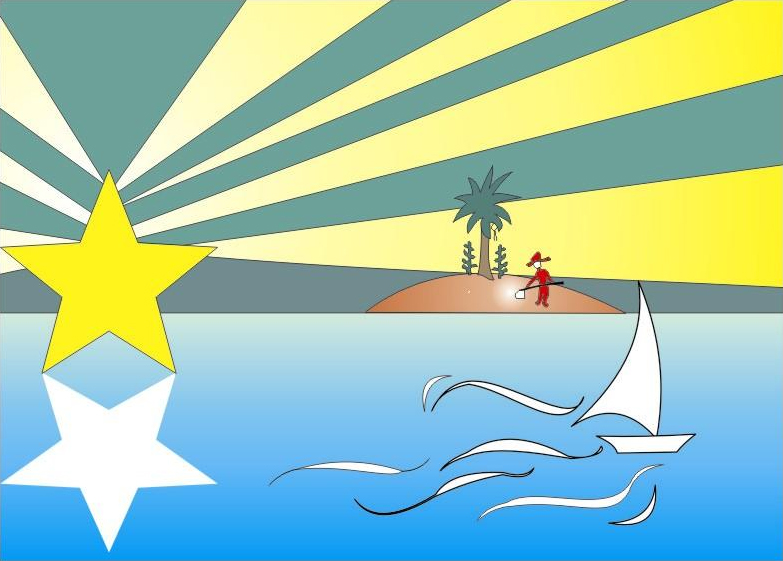 Bandeira de Conceição do Lago-Açu